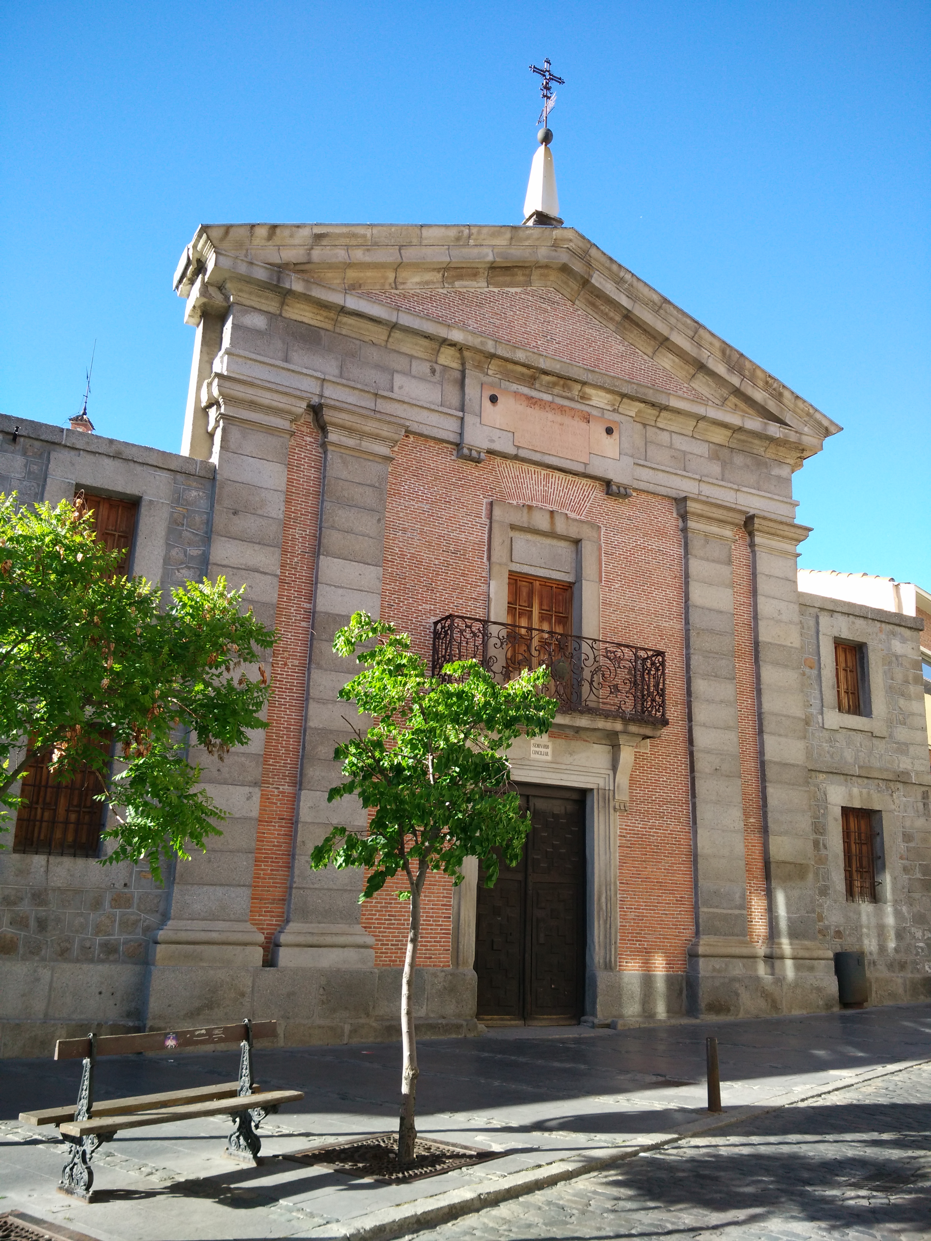 Portada del antiguo Seminario Conciliar de Ávila (situado en la calle Duque de Alba), actualmente es uno de los muros del patio del Colegio Diocesano.